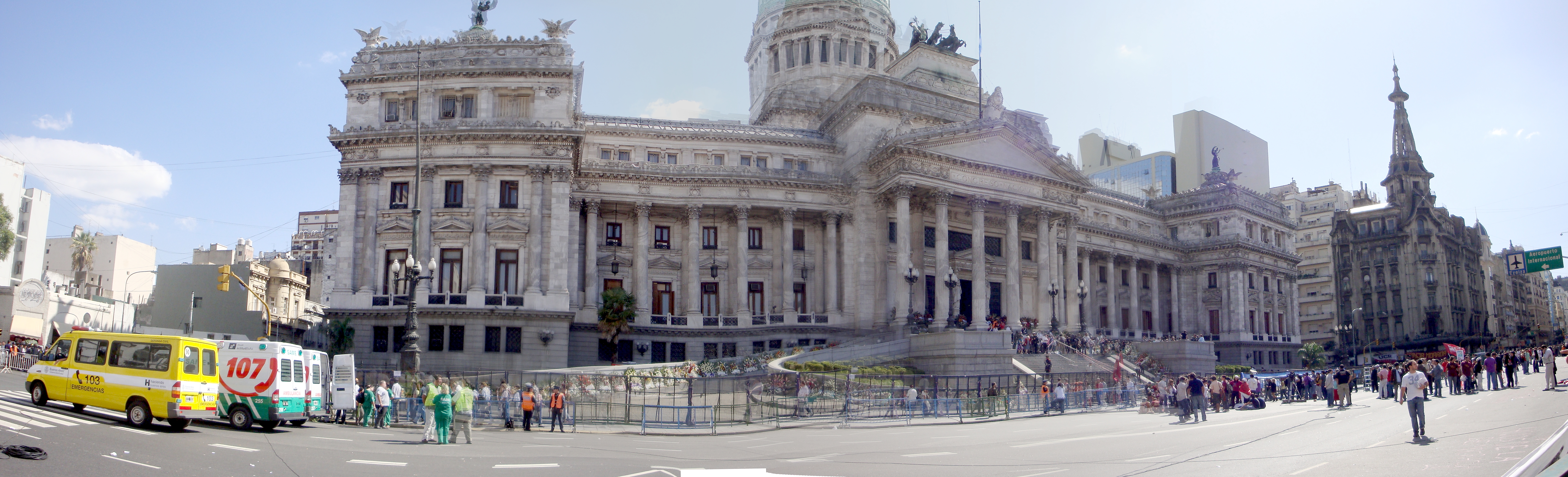 Unión de varias fotos del Congreso Nacional de Argentina, durante los funerales del ex presidente Raúl Alfonsín